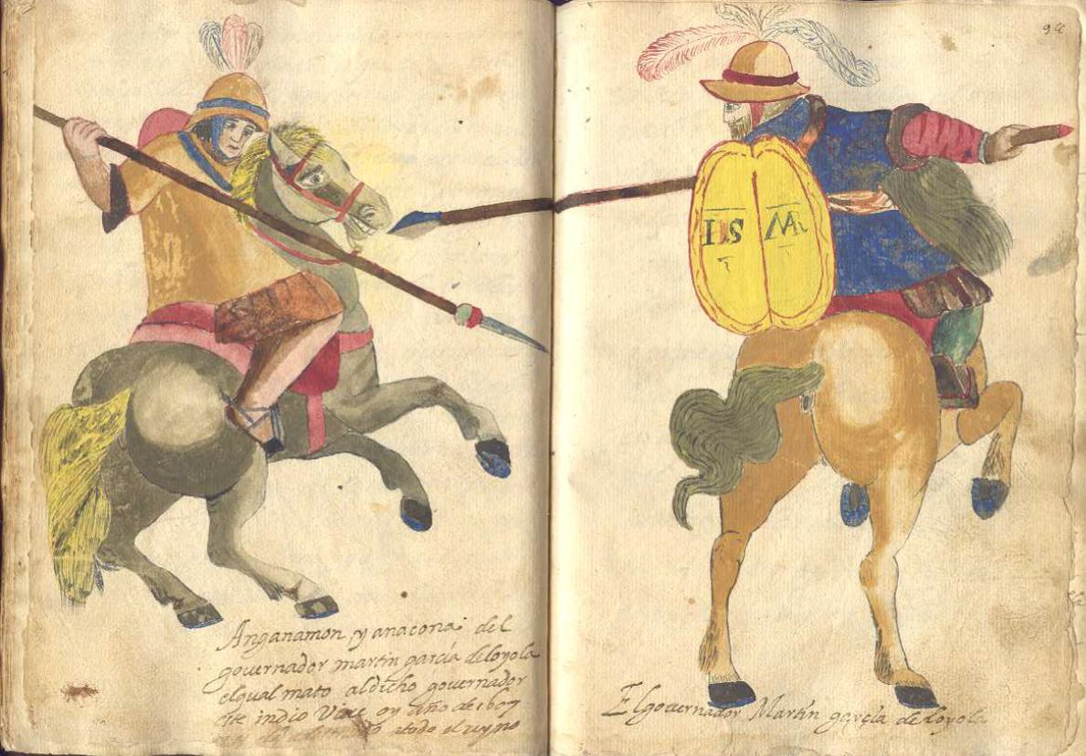 Anganamón vs. Martín García de Loyola (Ocaña, 1608).